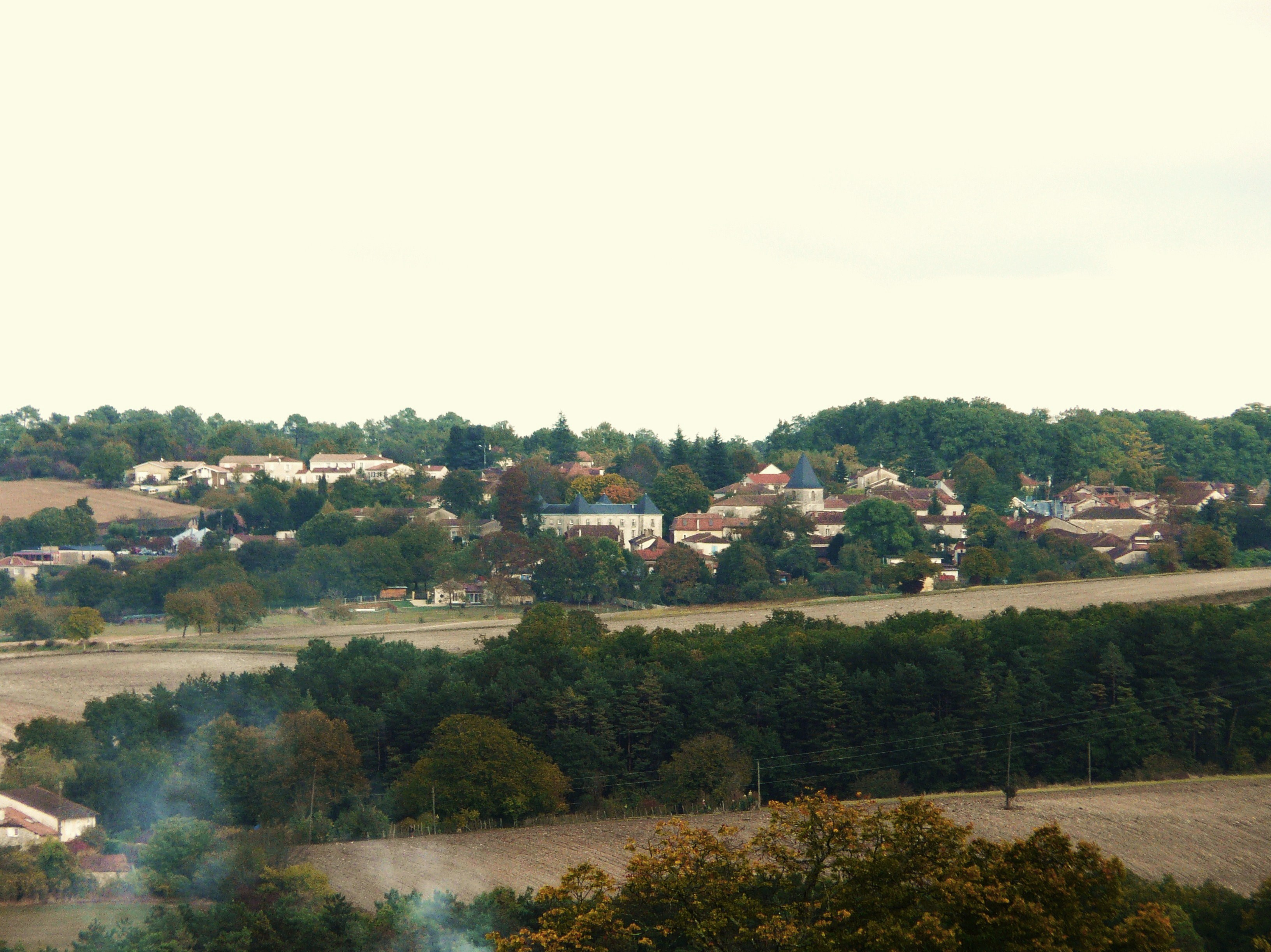 Le bourg de Mensignac, Dordogne, France